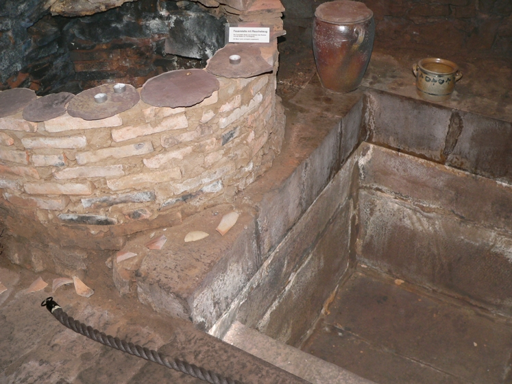 Trendelburger Mikwe (jüdisches Ritualbad) 17. Jahrhundert